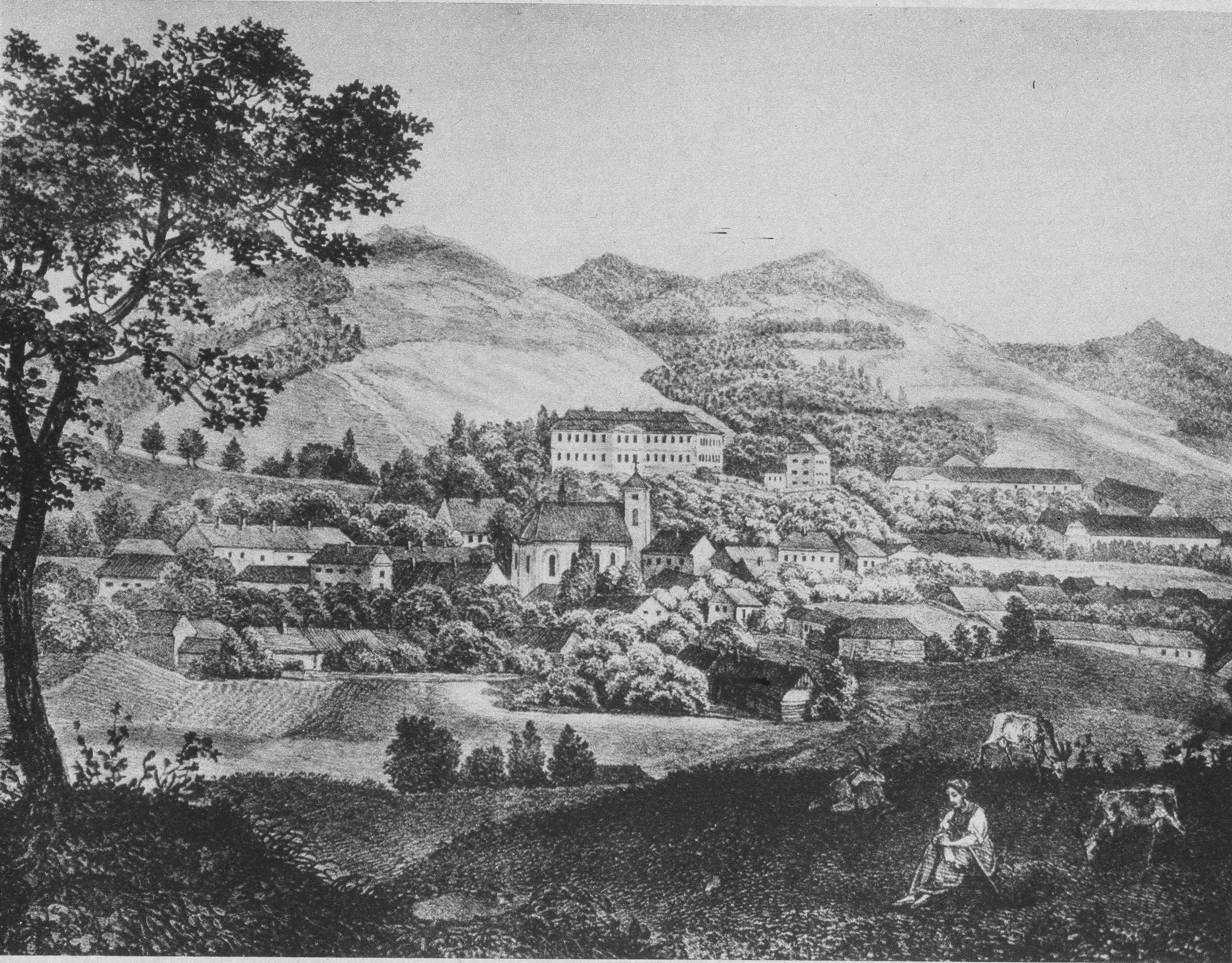 Koryčany v roce 1848, rytina Františka Alexandra Hebera.